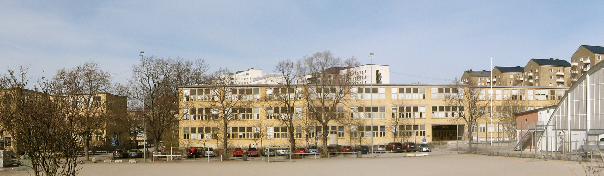 Entrance to Erikdalsskolan in april 2010.